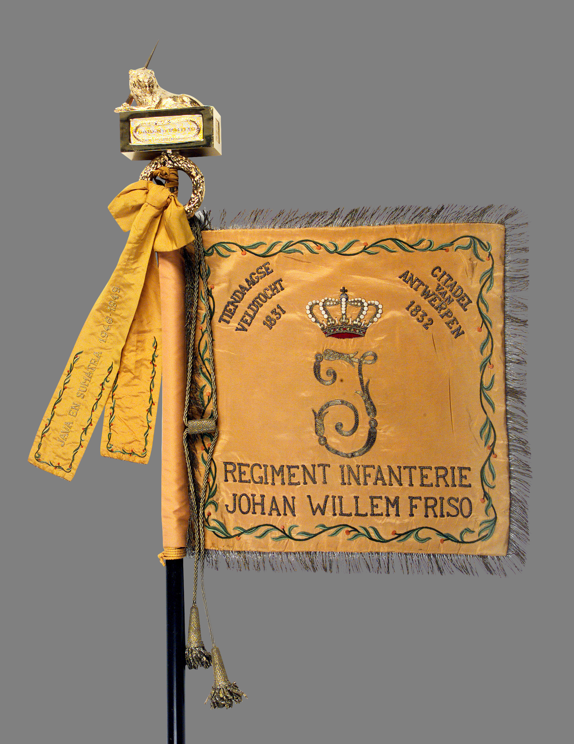 Het Regiment Infanterie Johan Willem Friso, kortweg aangeduid als JWF, kreeg het vaandel uitgereikt op 8 oktober 1951. Het doek is in 2008 vernieuwd. De opschriften zijn: Tiendaagse Veldtocht 1831 Citadel van Antwerpen 1832 Java en Sumatra 1946-1949 De naamgever van het regiment, prins Johan Willem Friso (1687-1711), behoorde tot de Friese tak van het geslacht Nassau. Hij was stadhouder van Friesland en Groningen. In zijn korte leven speelde hij een opmerkelijke rol als troepencommandant. De naam van de prins werd in 1950 aan het regiment verbonden, omdat het de traditie ging voortzetten van 2 infanterie-eenheden die hun thuisbasis in de noordelijke provincies hadden. Het regiment is gekoppeld aan 44 Pantserinfanteriebataljon (44 Painfbat). Dit maakte van 1979 tot 1983 deel uit van UNIFIL, de VN-vredesmacht in Zuid-Libanon. Een compagnie zette deze deelname daarna nog 2 jaar voort. Een nieuwe organisatiestructuur van de krijgsmacht in 1992 leidde tot het mobilisabel stellen van het bataljon. De traditie van JWF ging over naar 43 Pantserinfanteriebataljon, dat 2 jaar later uit de organisatie verdween. Het regiment hield op te bestaan. Door de herschikking van de gevechtskracht werd 44 Painfbat in 1999 weer paraat gesteld en keerde JWF terug, net als het vaandel. Op dit moment zijn behalve 44 Painfbat ook de Staf- en stafcompagnie 43 Gemechaniseerde Brigade en de Koninklijke Militaire Kapel Johan Willem Friso aan het regiment gekoppeld. Het oudste stamonderdeel van JWF werd opgericht in 1577. Daardoor geldt het als het oudste infanterieregiment van het Nederlandse leger. Literatuur: Thijs Brocades Zaalberg, Het Regiment Infanterie Johan Willem Friso (Den Haag 2011).